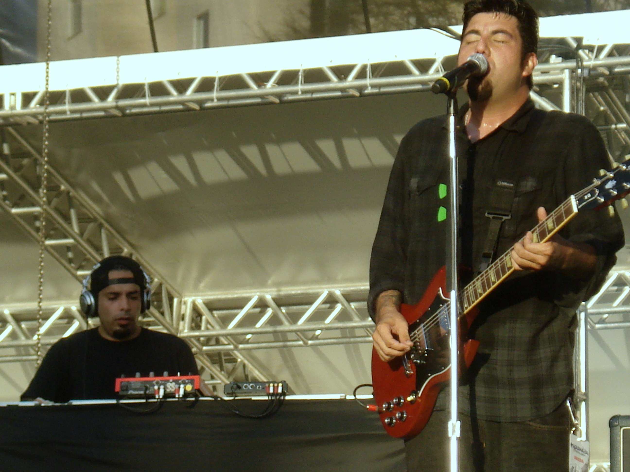 Maquinária Festival 2009 (São Paulo) - Deftones Concert